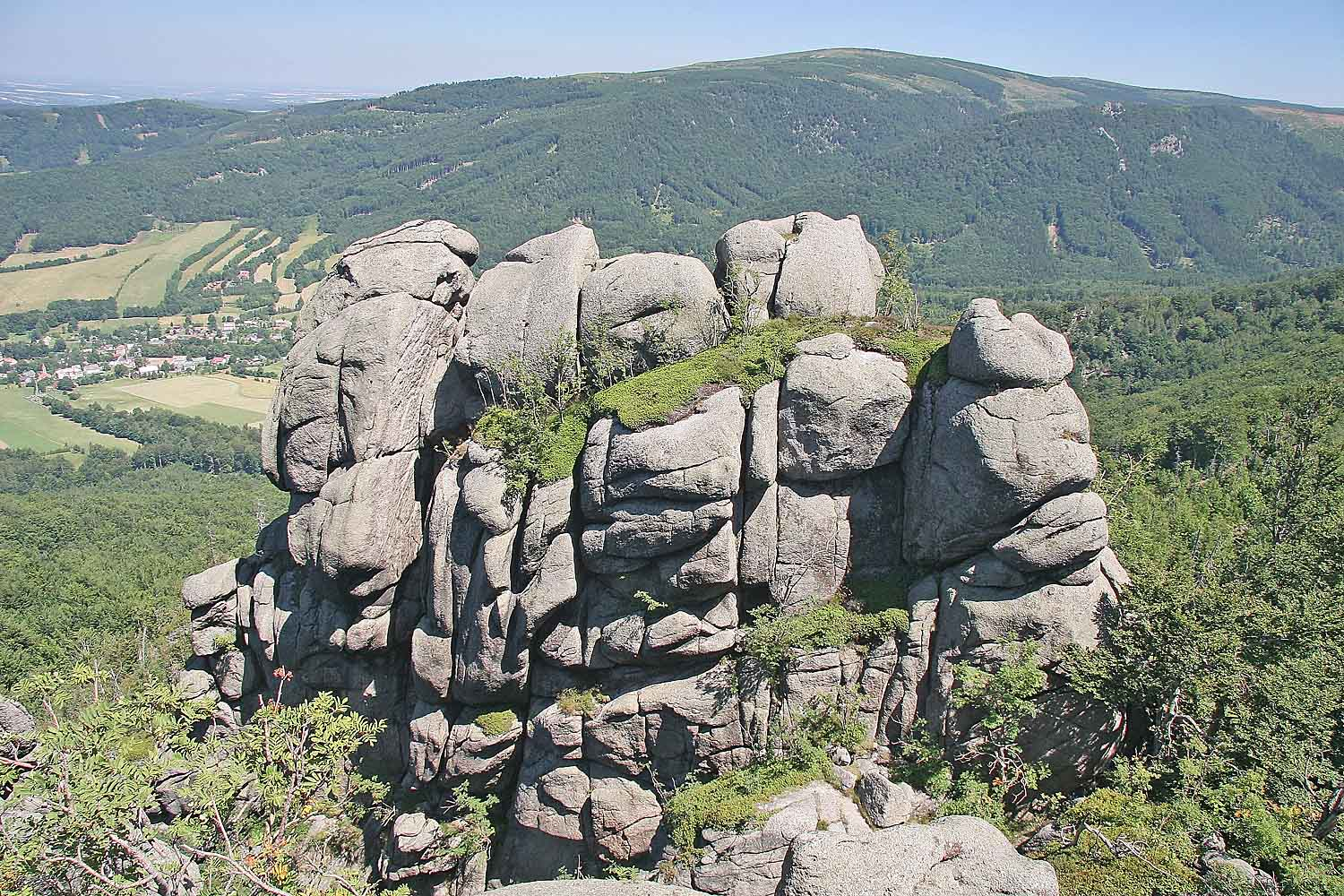 Frýdlantské cimbuří - pohled z vyhlídky směrem ke Smrku, Jizera Mountains, district Liberec, Czech Republic Autor: Prazak date: 19. 7. 2006